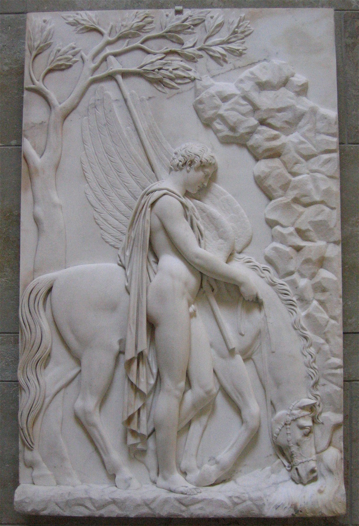 Julius Troschel: Bellerophon und Pegasus, um 1840/50, Neue Pinakothek in München